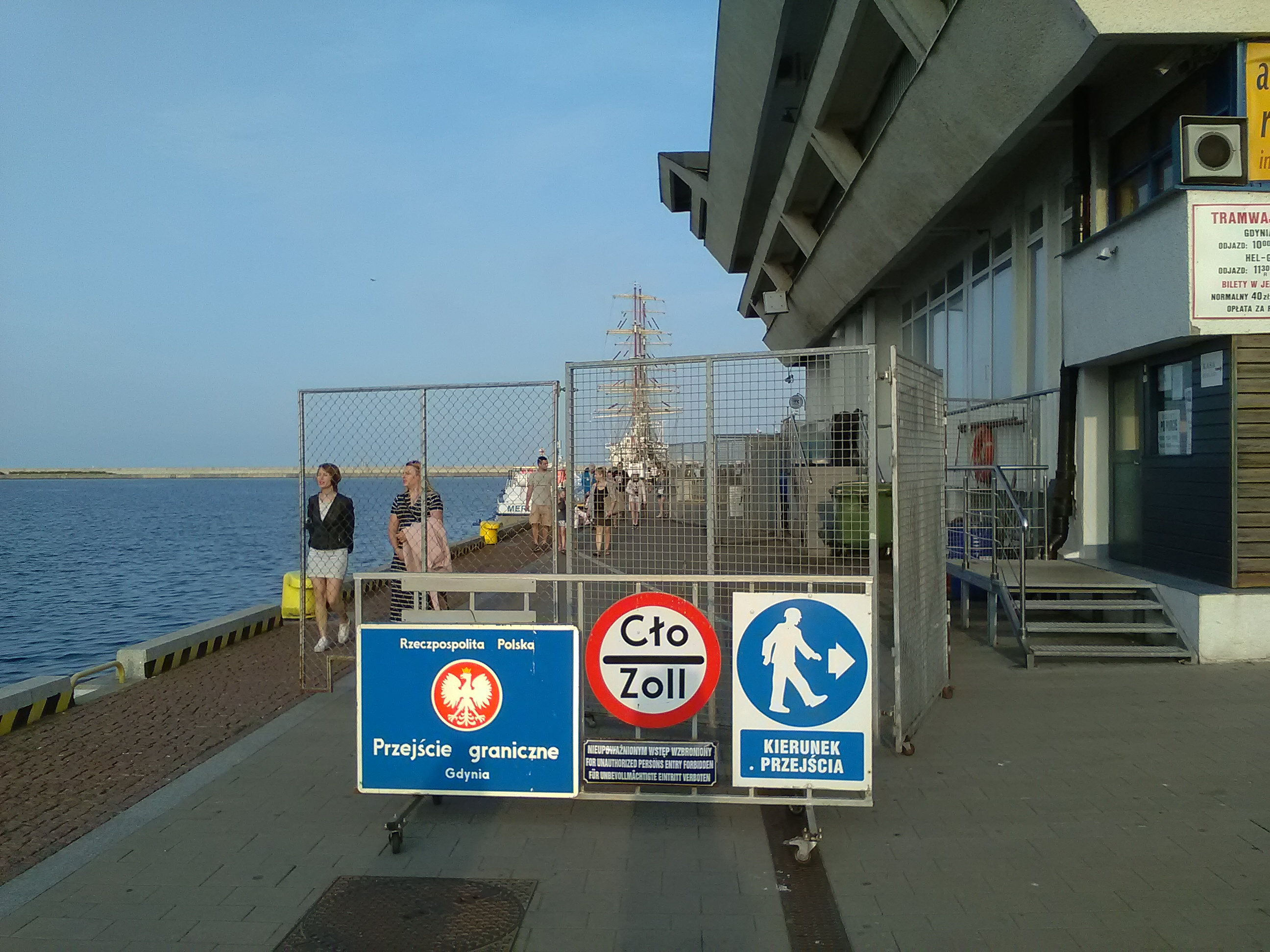 Morskie przejście graniczne w Gdyni przy Nabrzeżu Pomorskim.